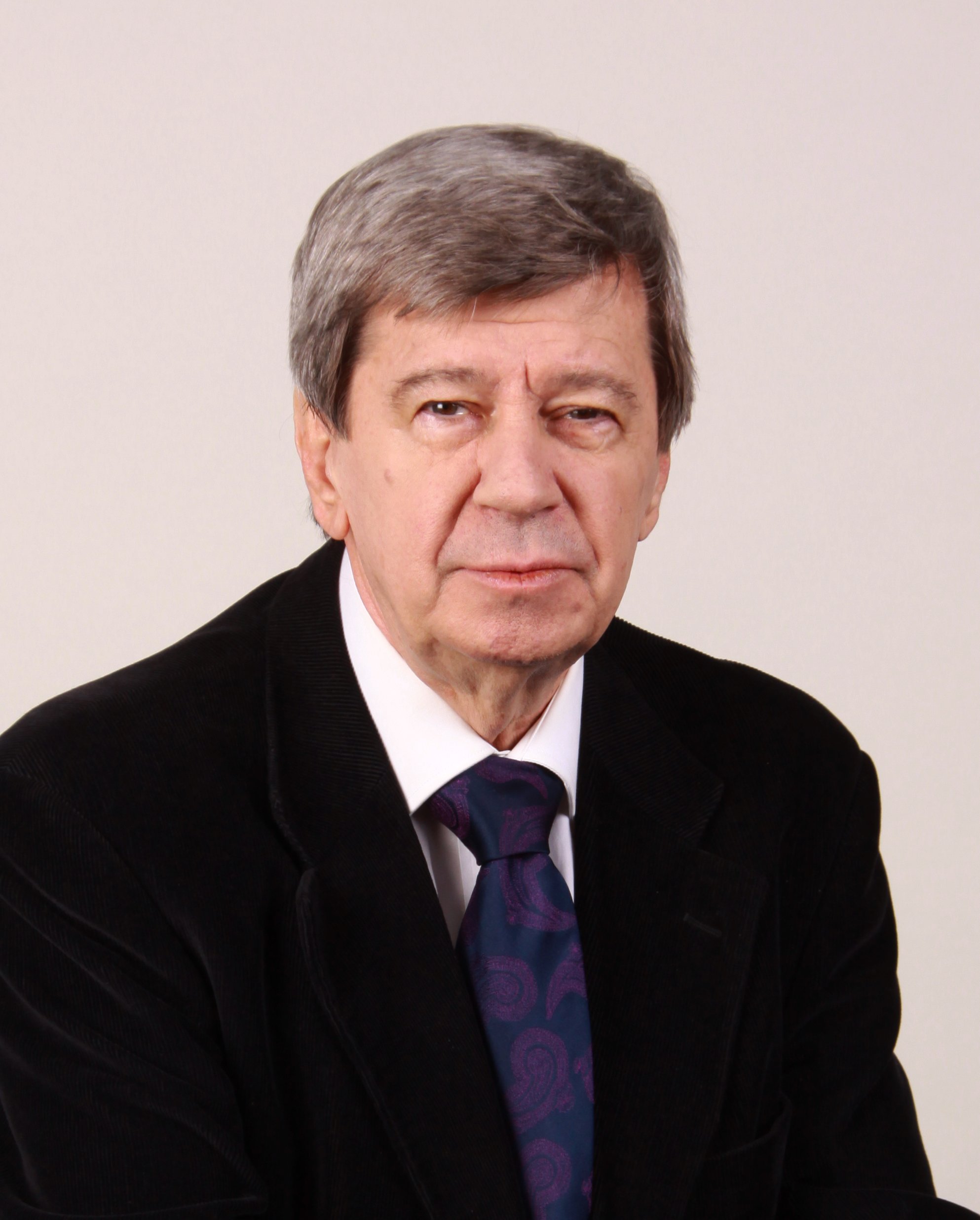 Abgeordnete/r Europaparlament